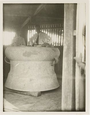 atas perkenan Opu Bontobangun Massairang Daeng Mangatta (1895–1936), AA Cense mengunjungi gong nekara (Keteltrom) di Bontobangun